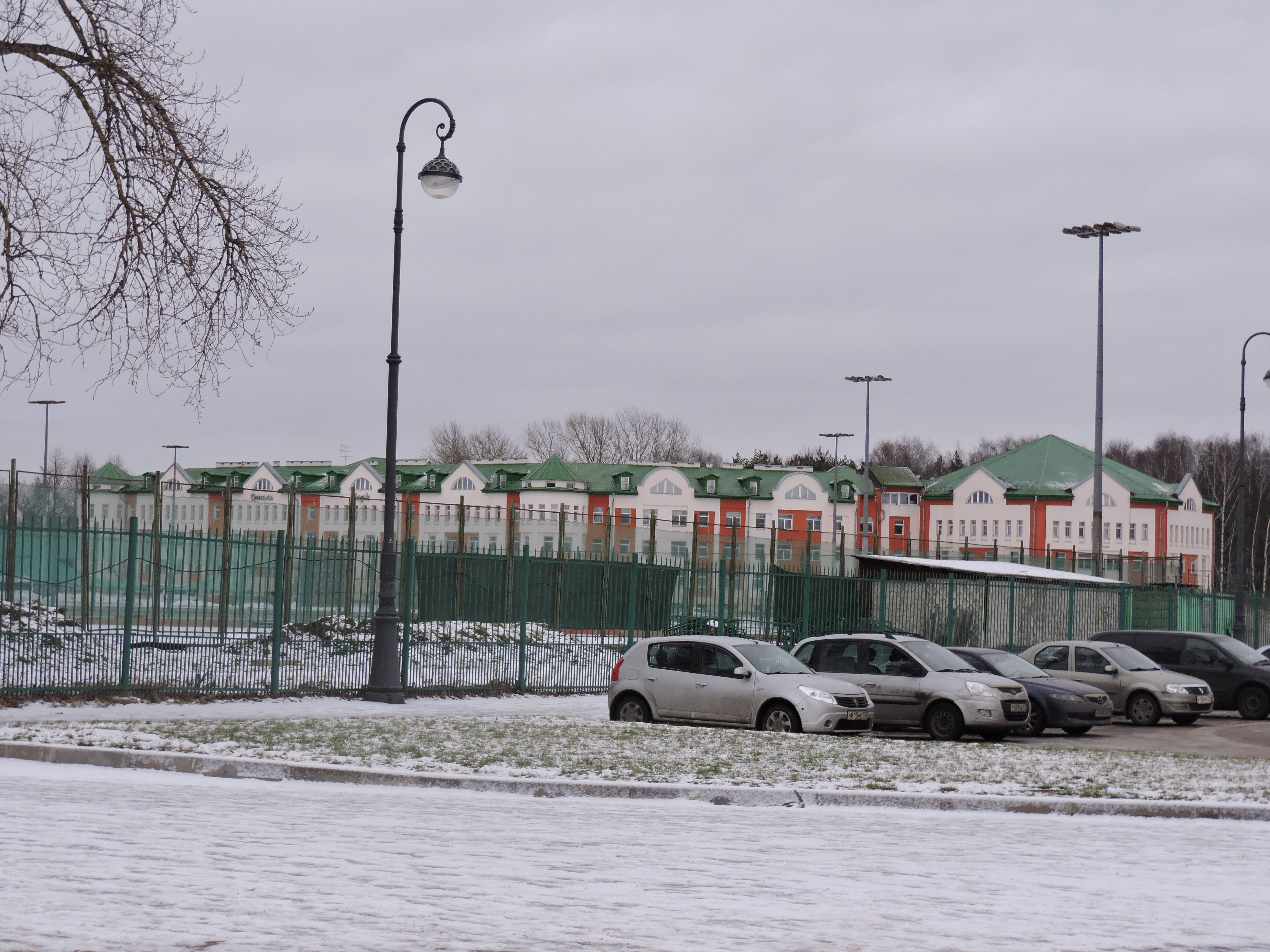 Гостиница "Отель-Парк"